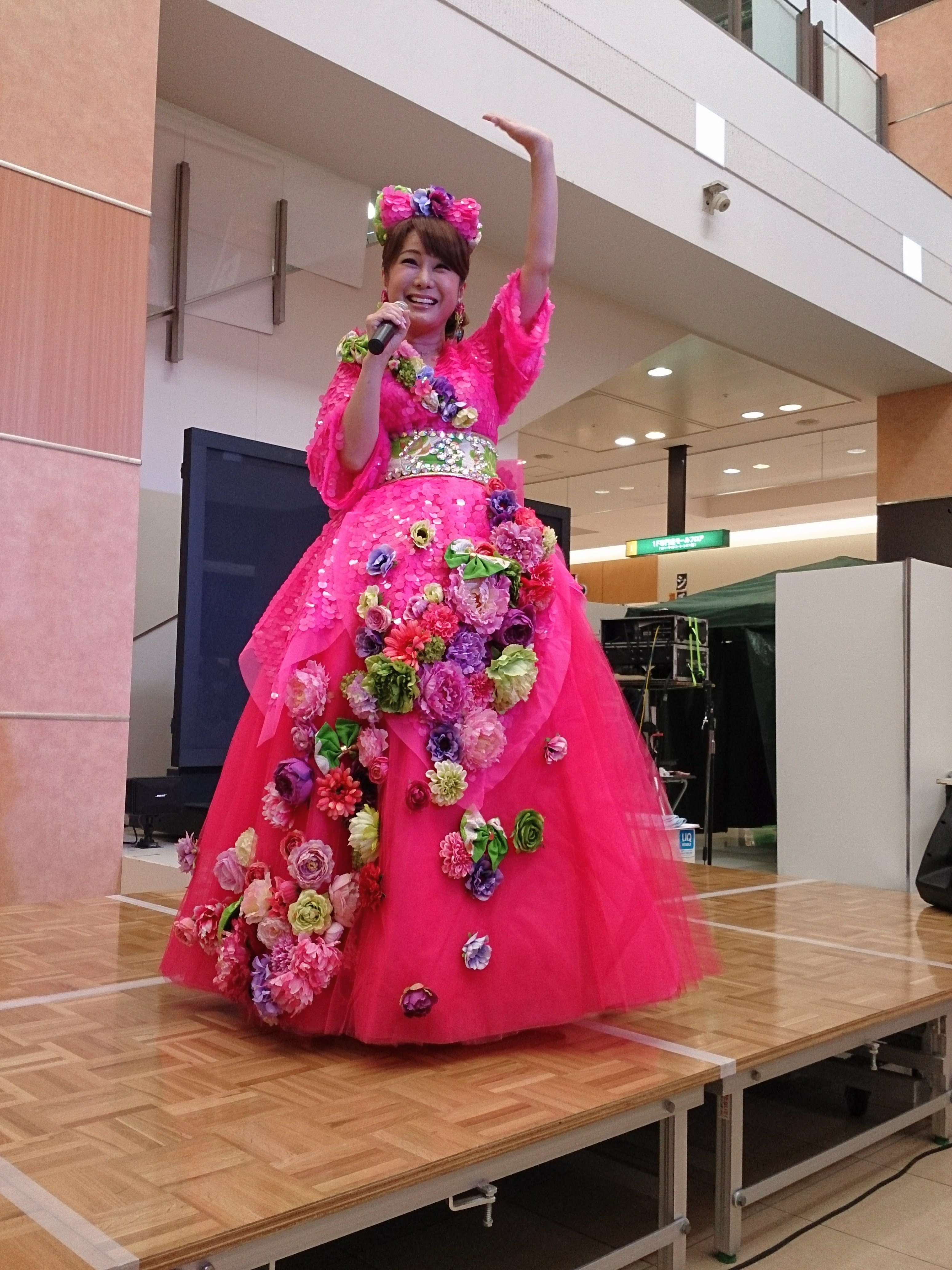 はるな愛・長岡市 リバーサイド千秋にて